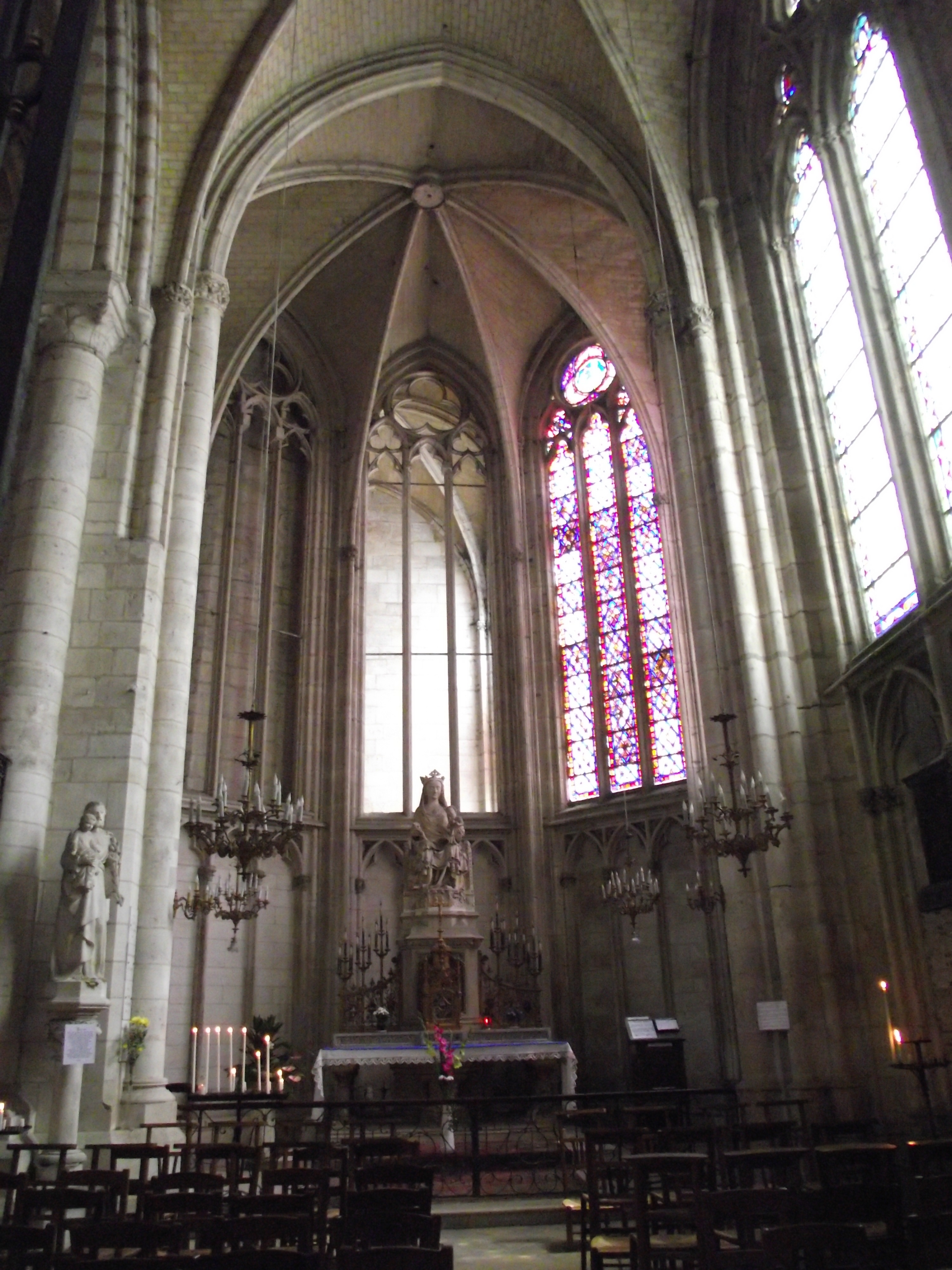 Sens, Cattedrale di Santo Stefano